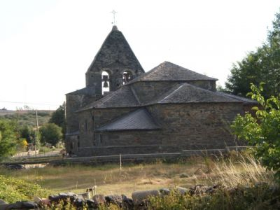 Iglesia de Villagaton, fotografia cedida a por un vecino de Villagaton.